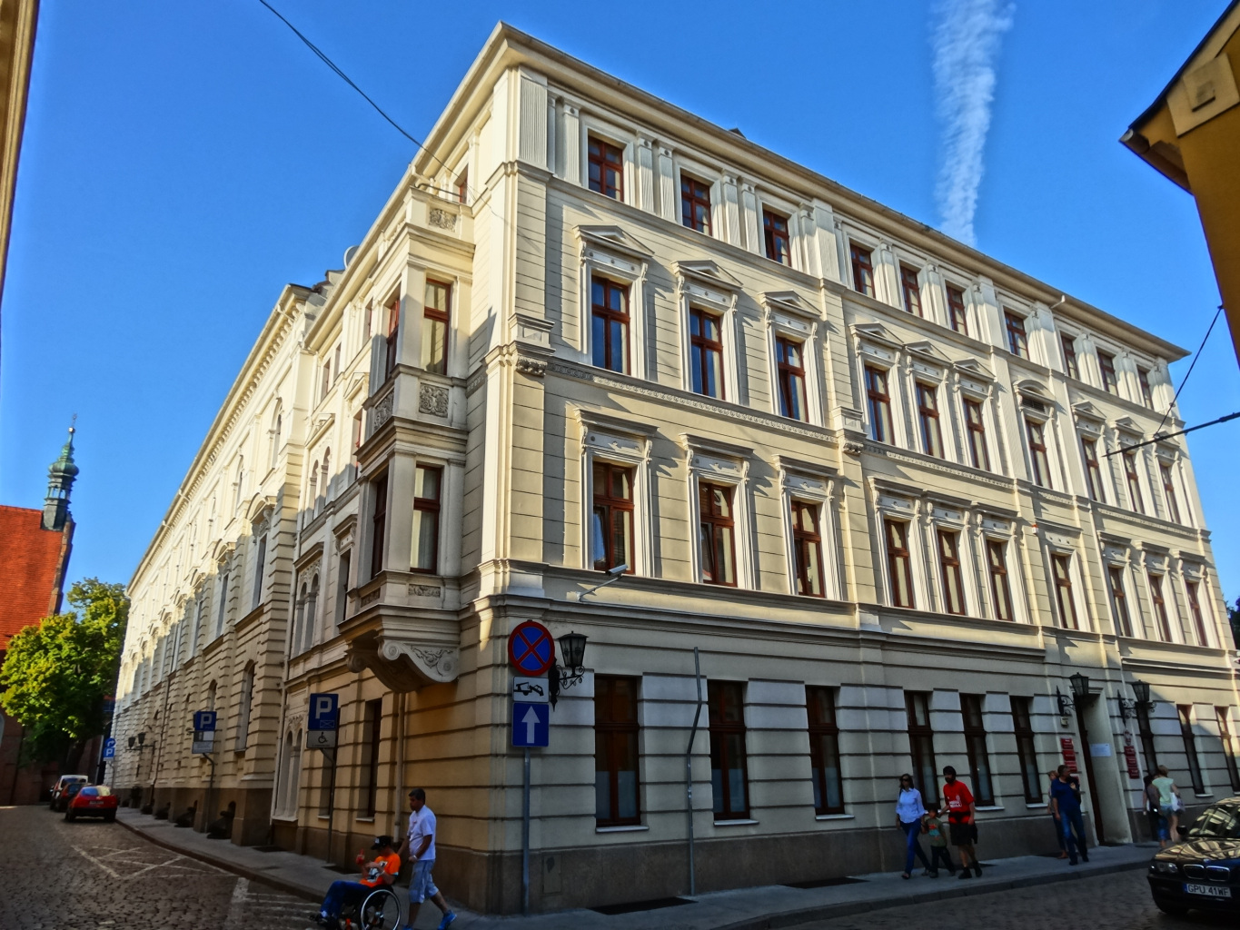 Ratusz w Bydgoszczy przy ul. Jezuickiej/Starym Rynku, dawne Kolegium Jezuickie (XVII w.)